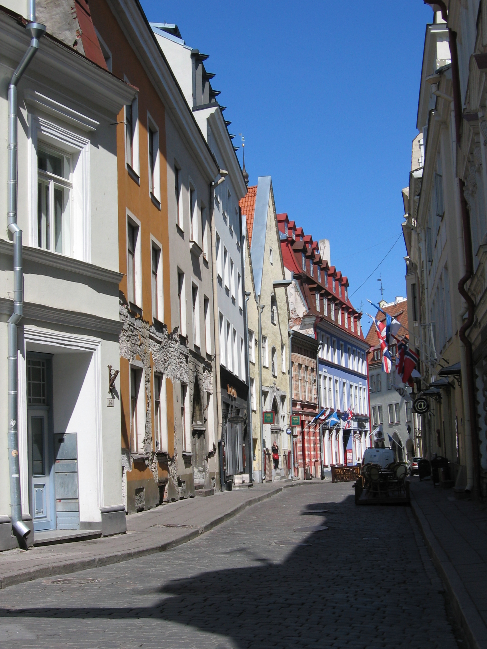 Tallinn, Stadtzentrum